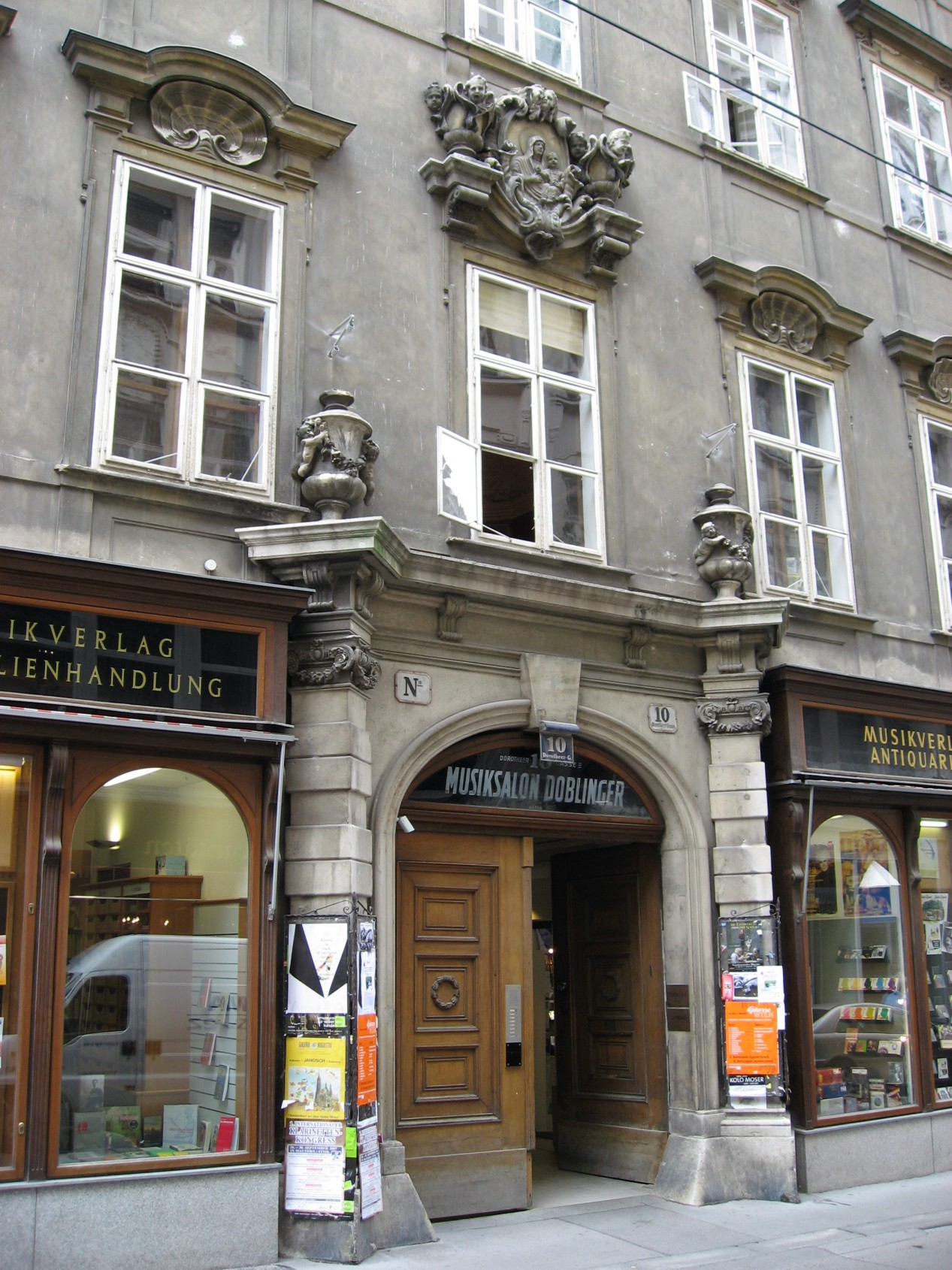 Wien Palais Dietrichstein an der Dorotheergasse